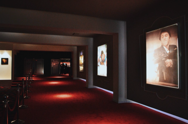 Imagen del interior de la sala de cine Phenomena.